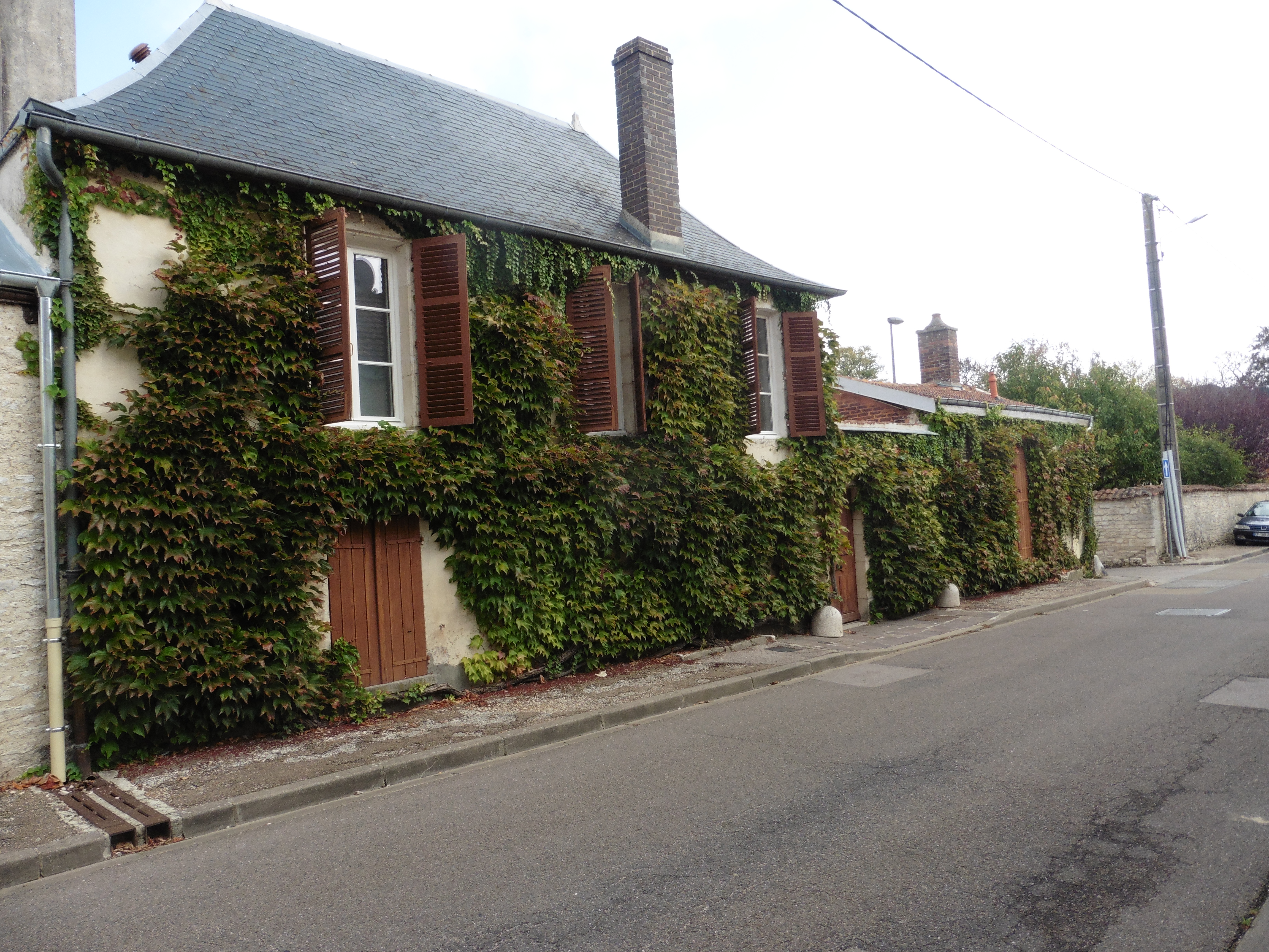 Photo de la maison de la rue Gaston Bachelard